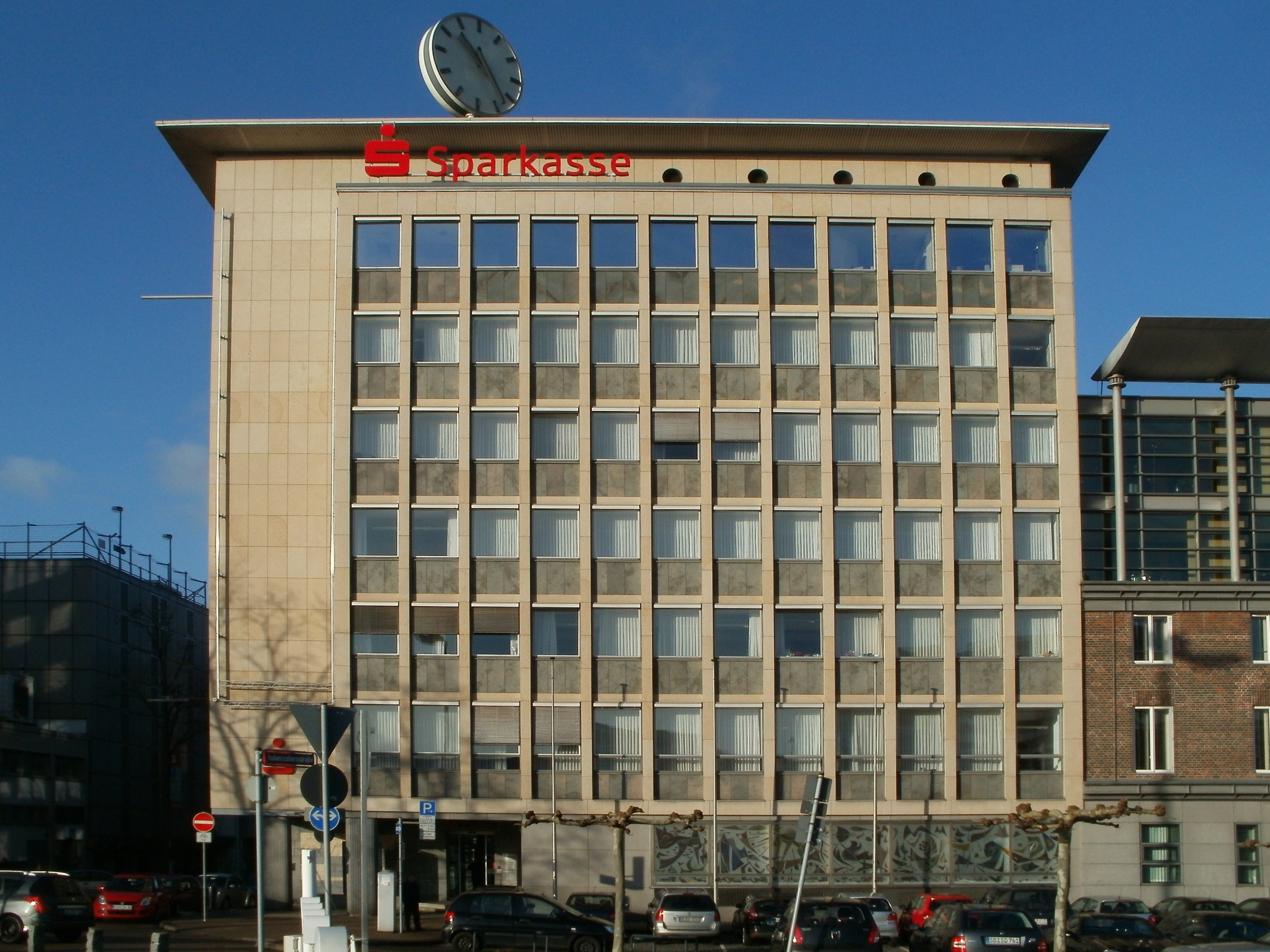 Sparkasse am Neumarkt (Saarbrücken)